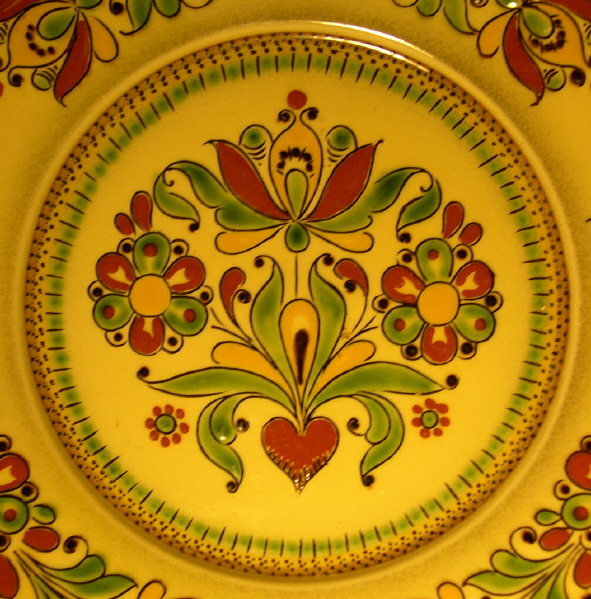 Langnauer Keramik: Boden eines Tellers aus der Töpferei U. Kohler, Schüpbach. Handarbeit.